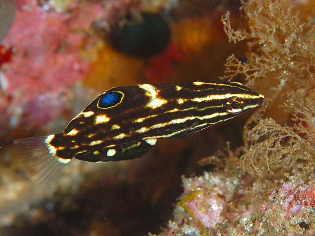 カノコベラ Halichoeres marginatus